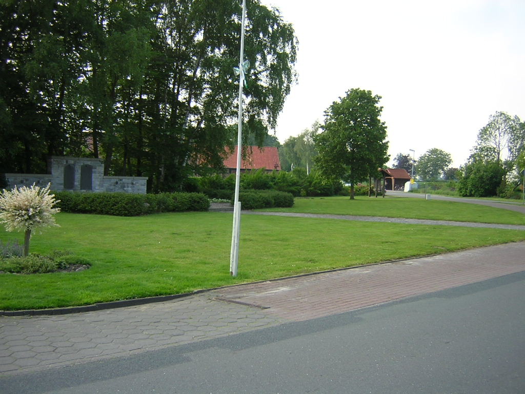 Albringhausen, mit Denkmal und Bushaltestelle